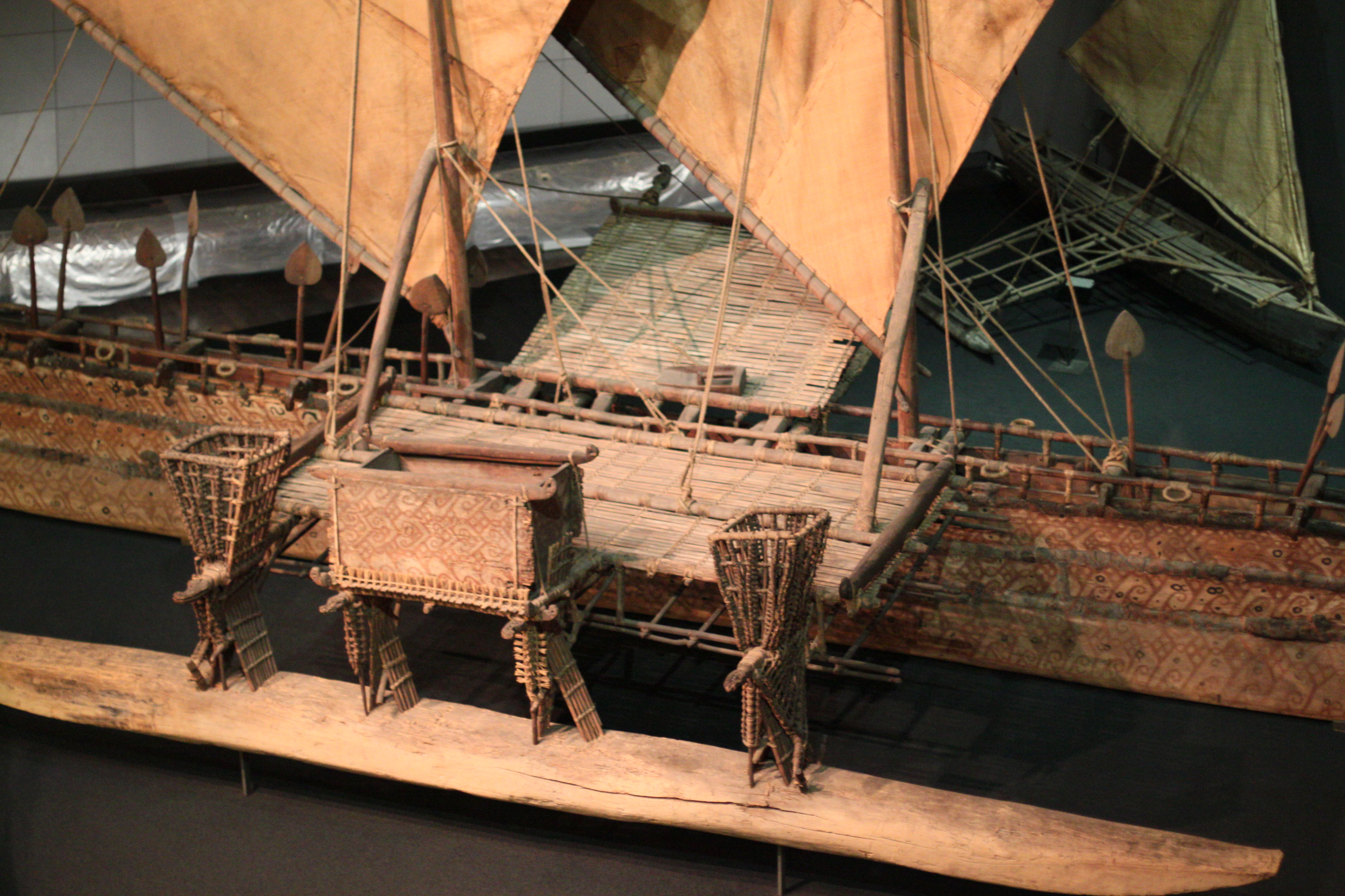 Südseeabteilung im Ethnologischen Museum, Berlin-Dahlem